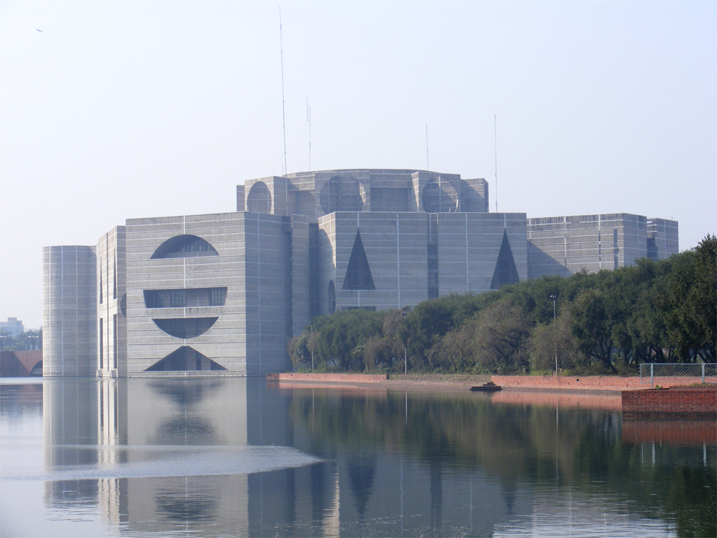 বাংলাদেশের জাতীয় নির্বাচন ২০০৮-এর দিন তোলা জাতীয় সংসদ ভবনের পেছনের দিকের ছবি।